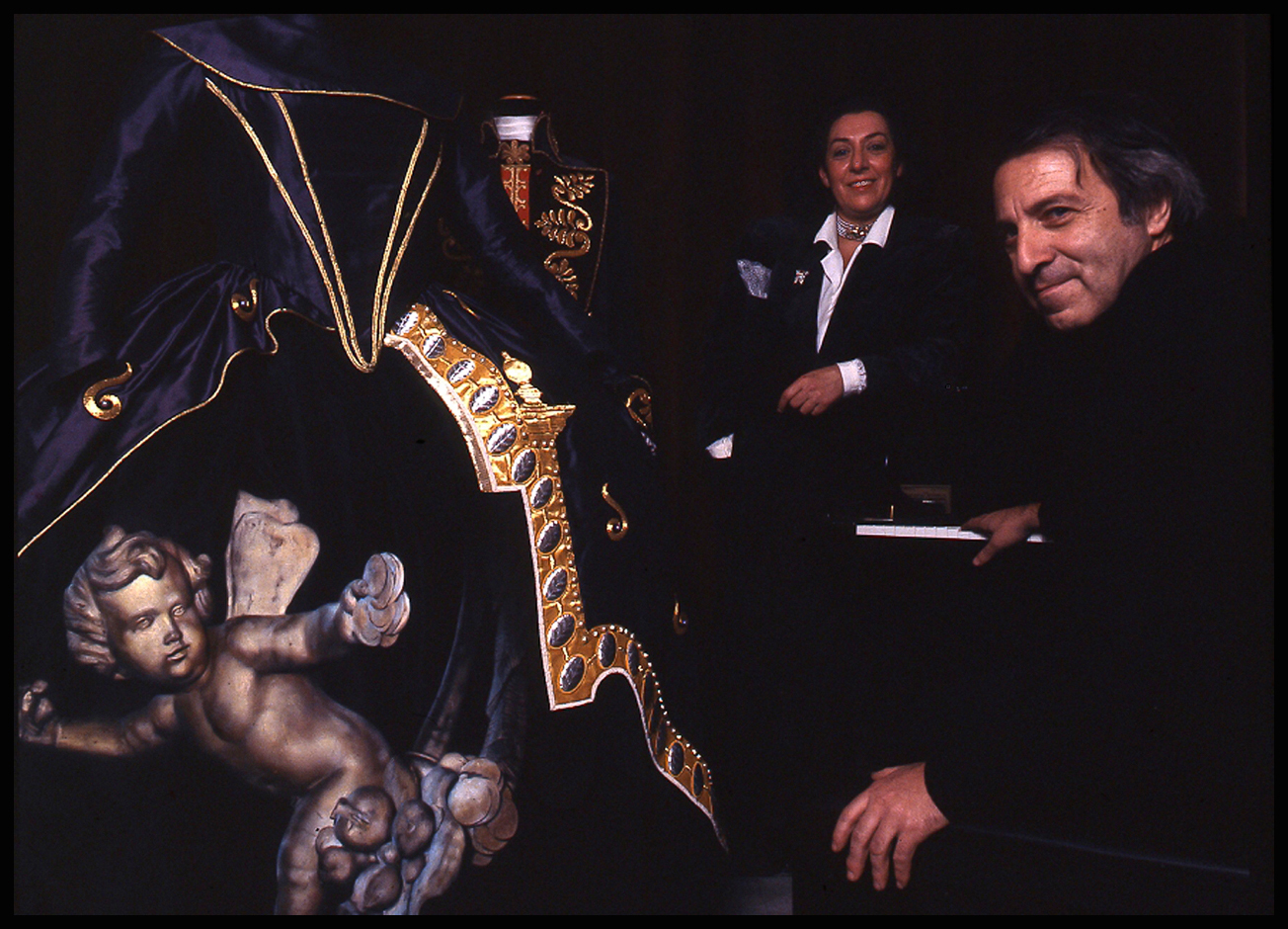 Roberto De Simone e Odette Nicoletti con i suoi costumi - foto di Augusto De Luca.